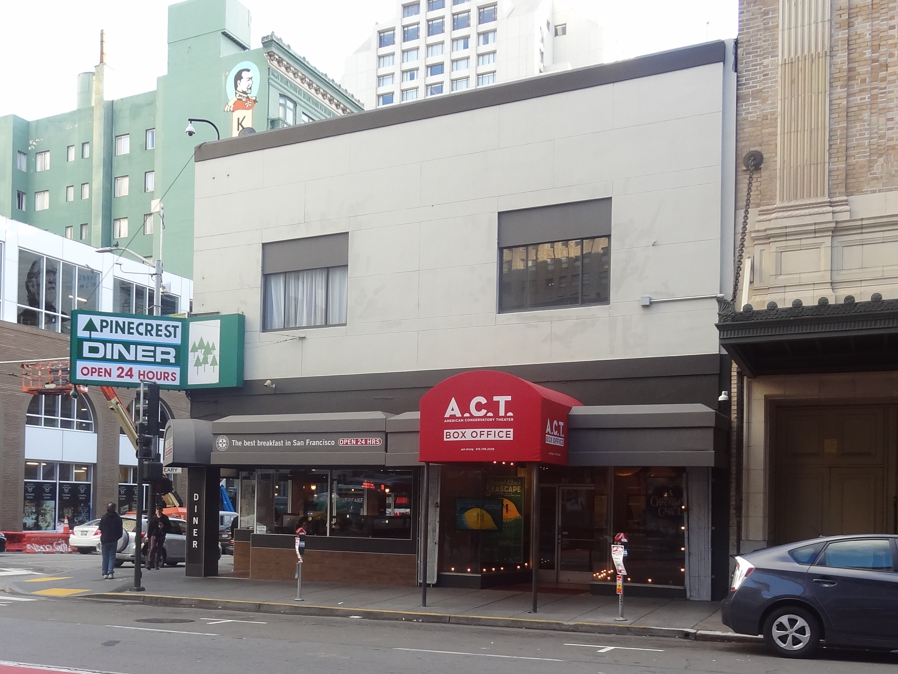 Pinecrest Diner